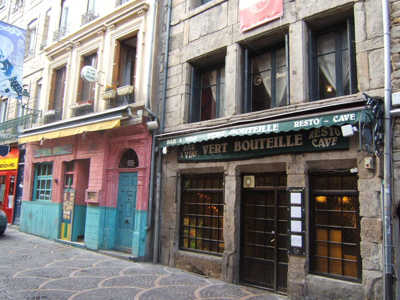 photo par l'auteur d'une rue piétonne à st etienne